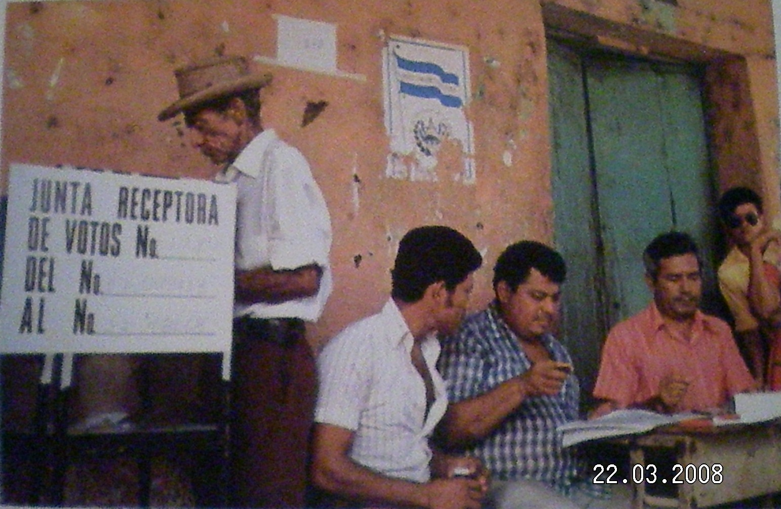 Realización del sufragio salvadoreño en una típica urna del país.